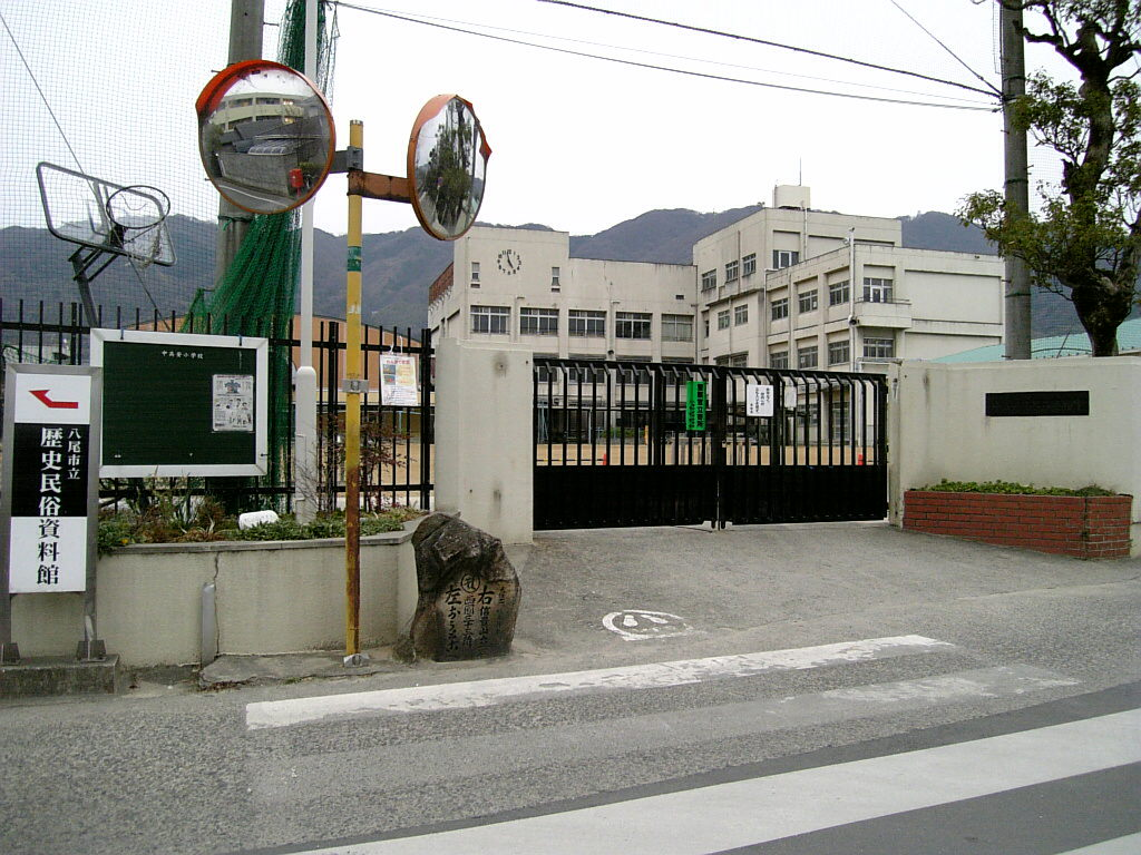 八尾市立中高安小学校